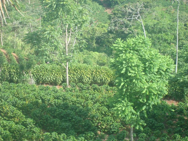 Plantación de café en Palmichal de Acosta. Costa Rica.